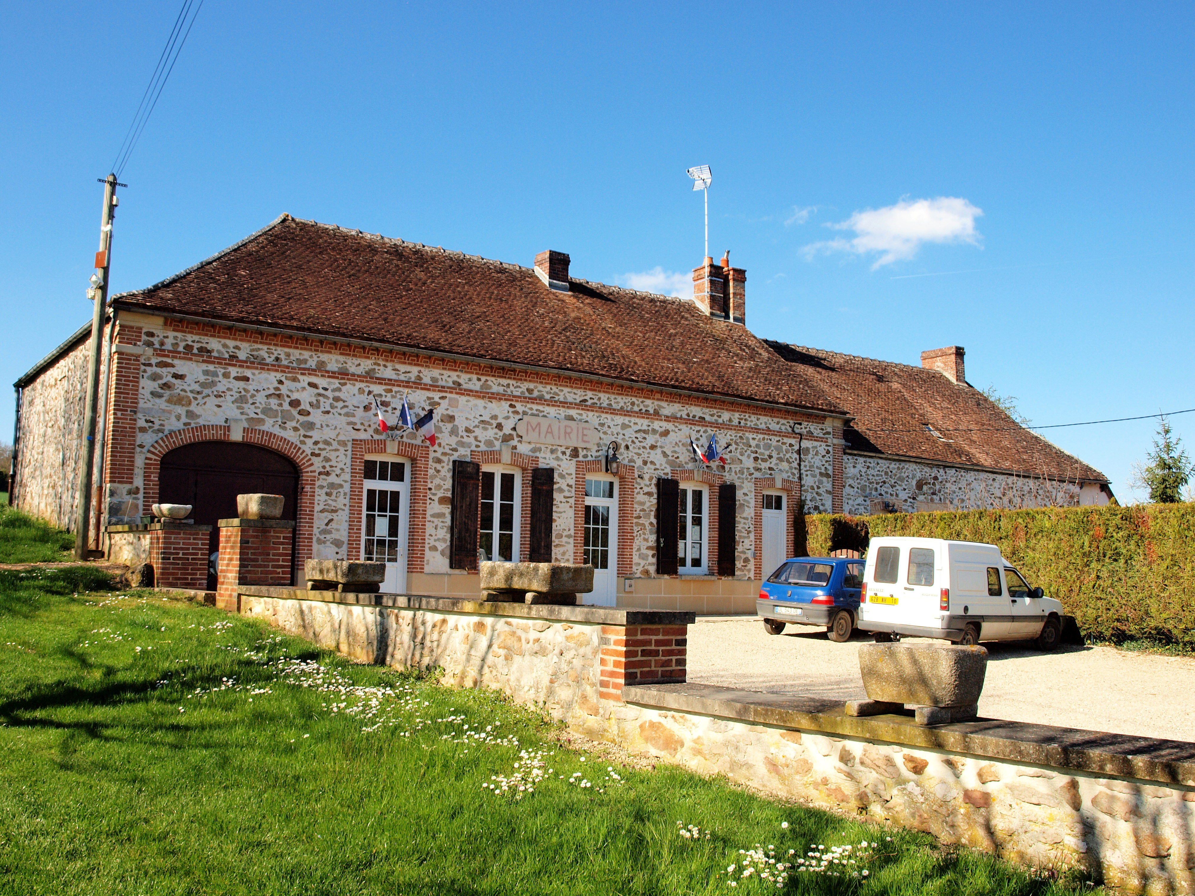 Saint-Nicolas-la-Chapelle (Aube, France)